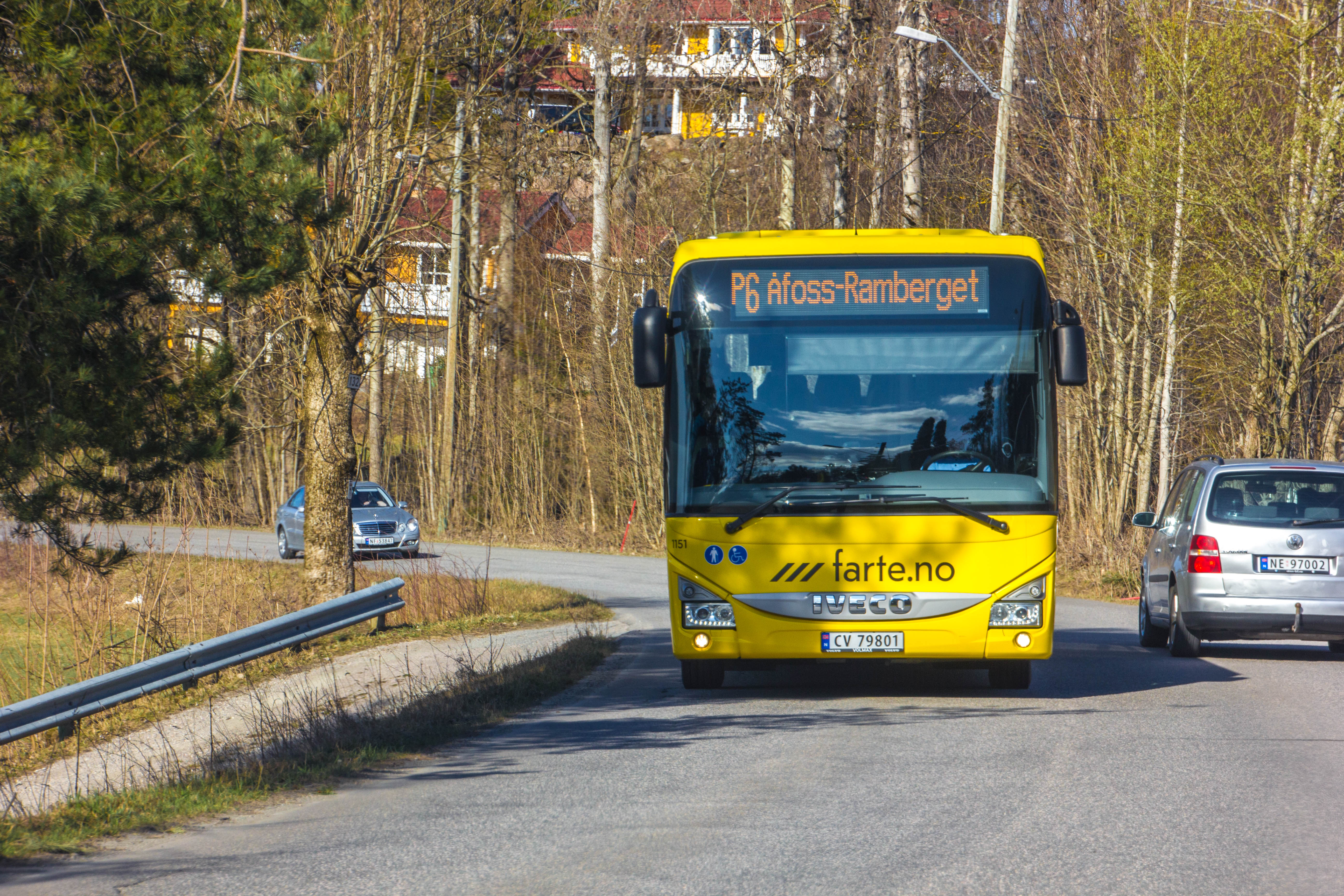 En Iveco Crossway Low Entry på rute P6 til Åfoss ved Brekka.